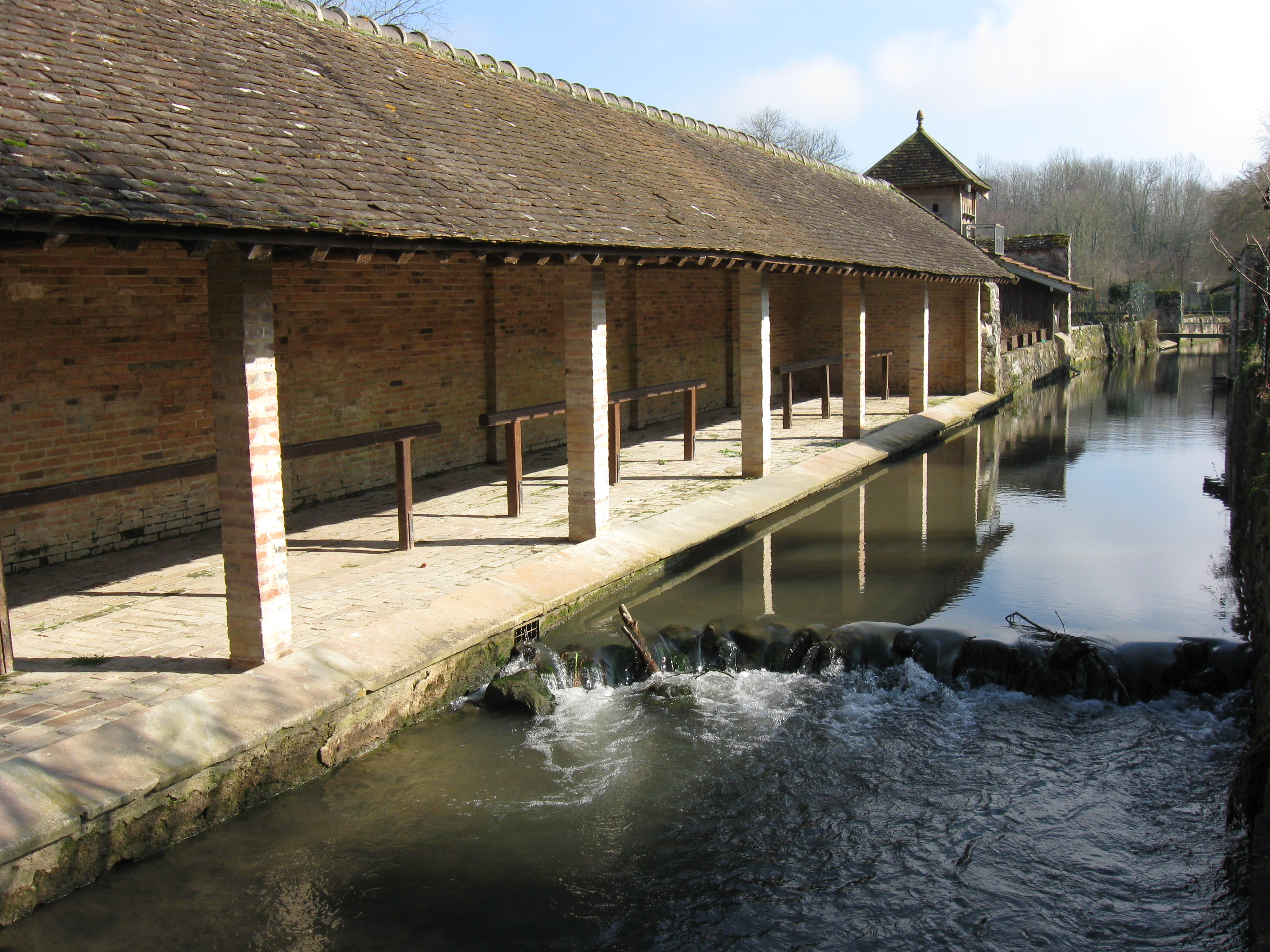 Lavoir sur le bord de l'Orvanne à Flagy. (Seine-et-Marne, région Île-de-France).